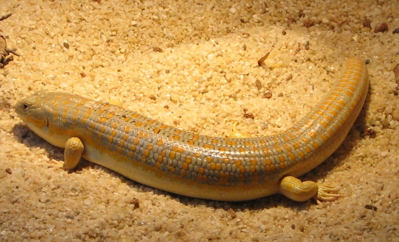 Schneider's skink (Novoeumeces schneideri)